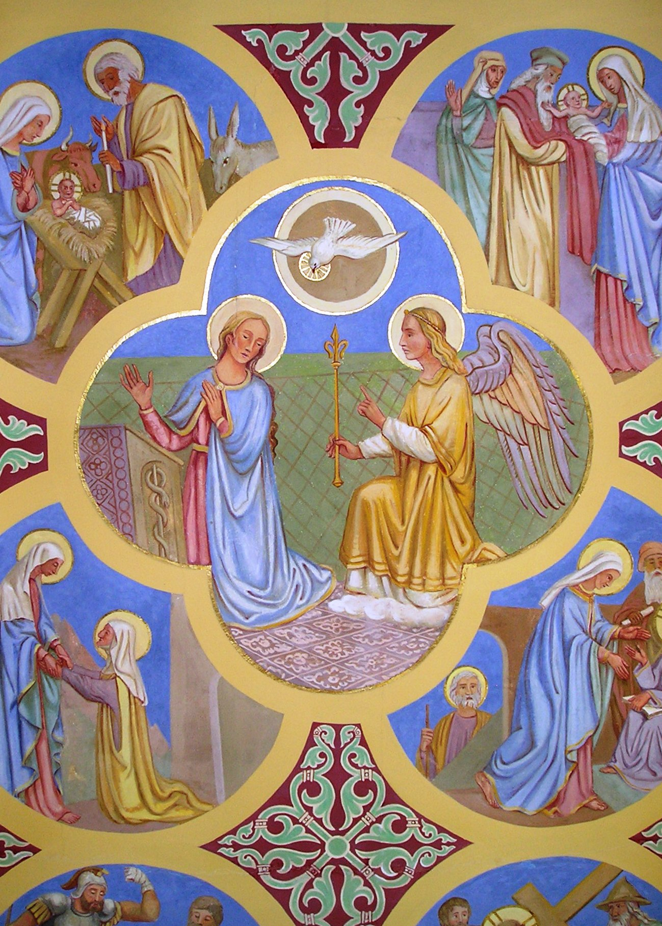 Ilbling_im_Landkreis_Eichstätt,_Deckengemälde_von_Sebastian_Mutzl